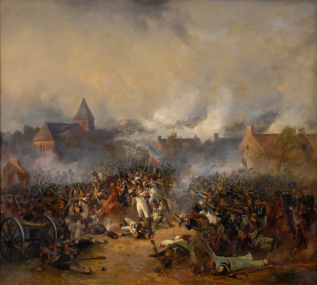 Erstürmung des Dorfes Planchenois in der Schlacht von Waterloo am 18. Juni 1815. Signiert. Datiert 1843. Öl auf Leinwand, 90 x 100 cm.